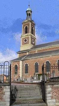 kerk van Vlijtingen in de gemeente Riemst, Belgisch Limburg